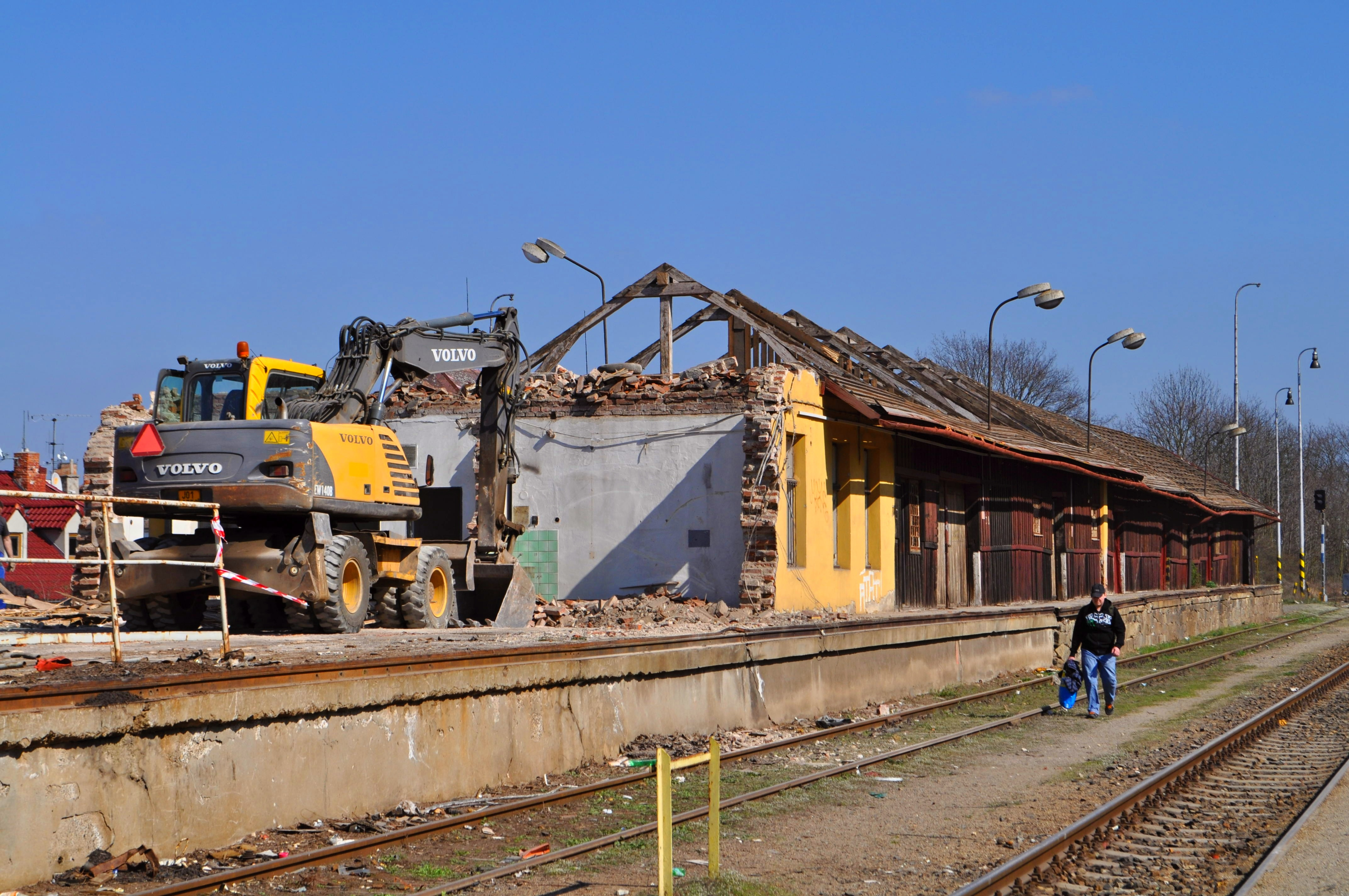 Demolice skladiště v Třebíči